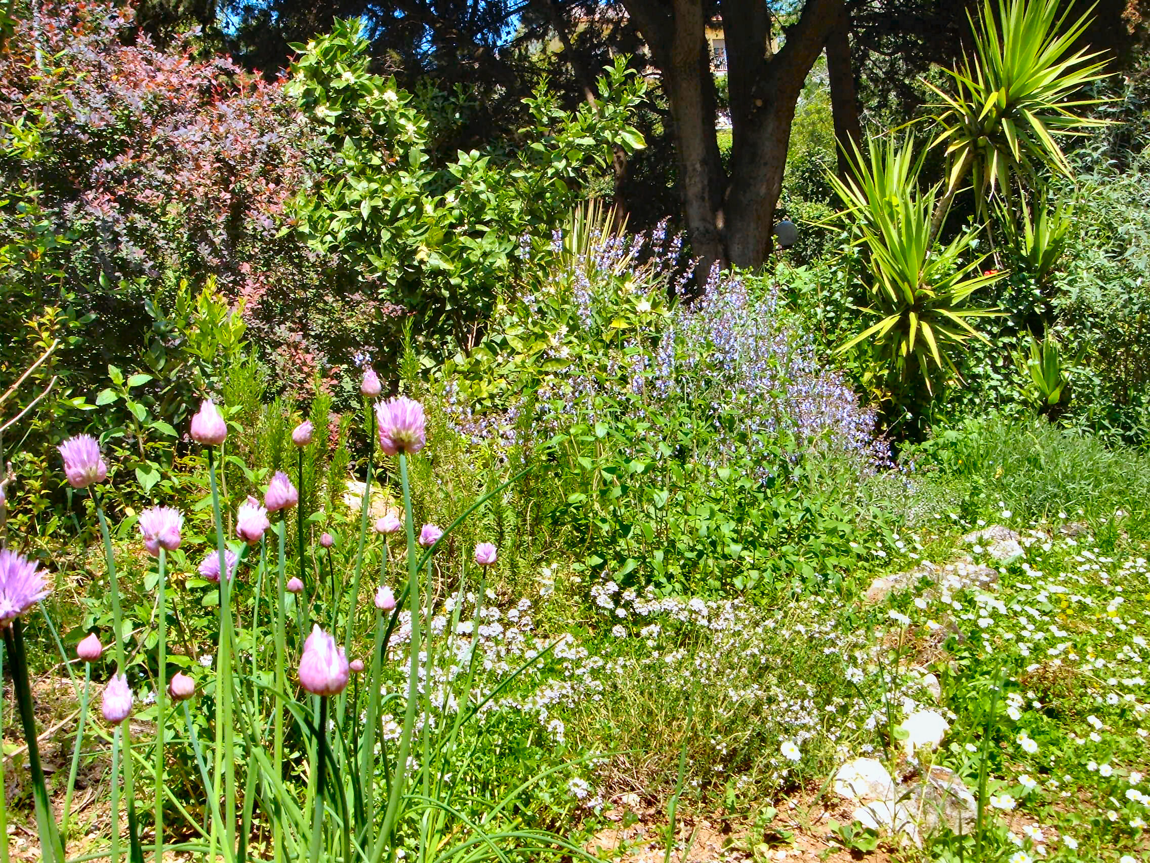 Il giardino in primavera